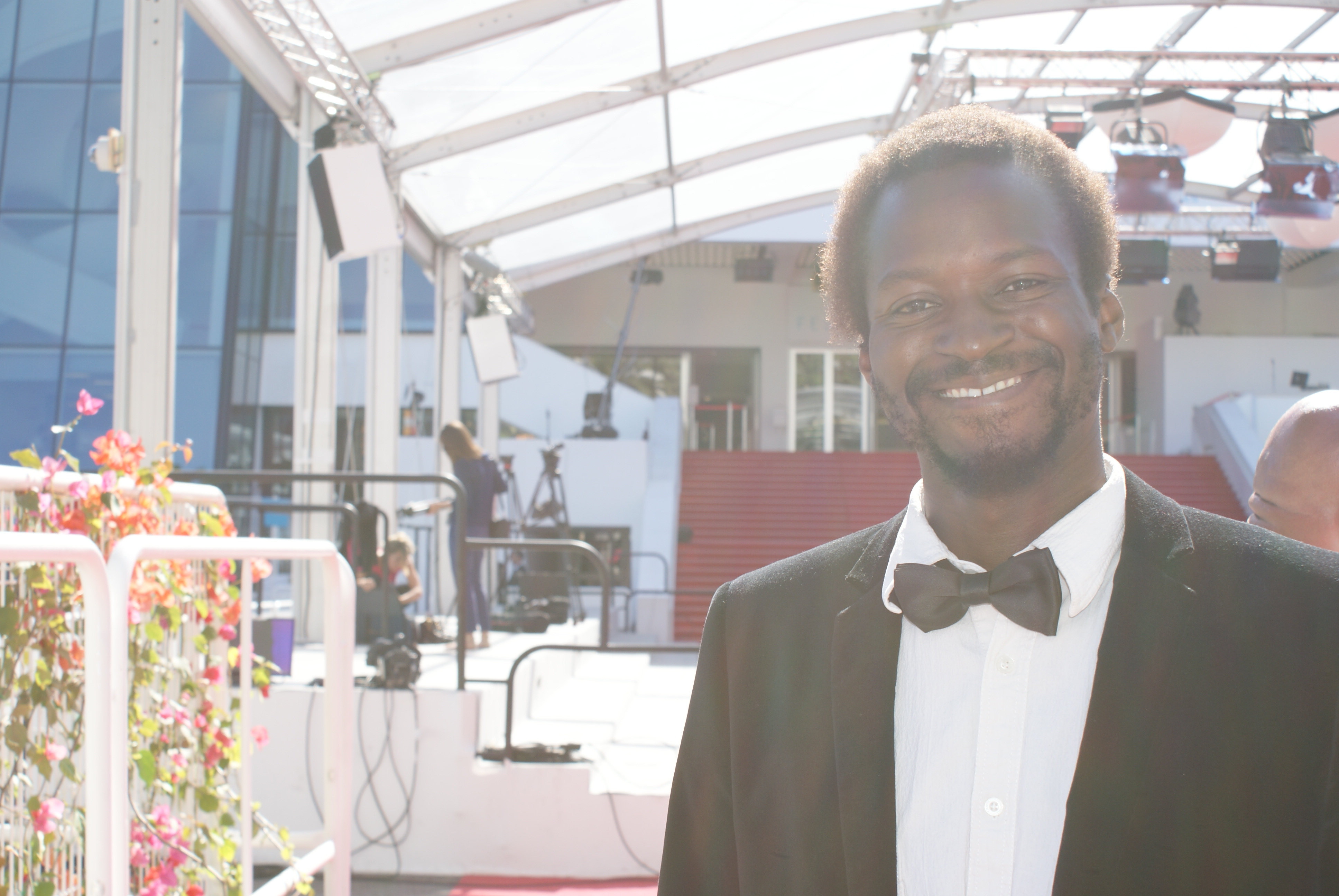 Emmanuel Buriez cannes